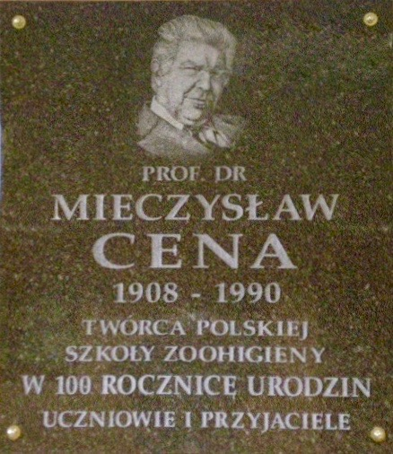 tablica pamiątkowa - prof. Mieczysław Cena